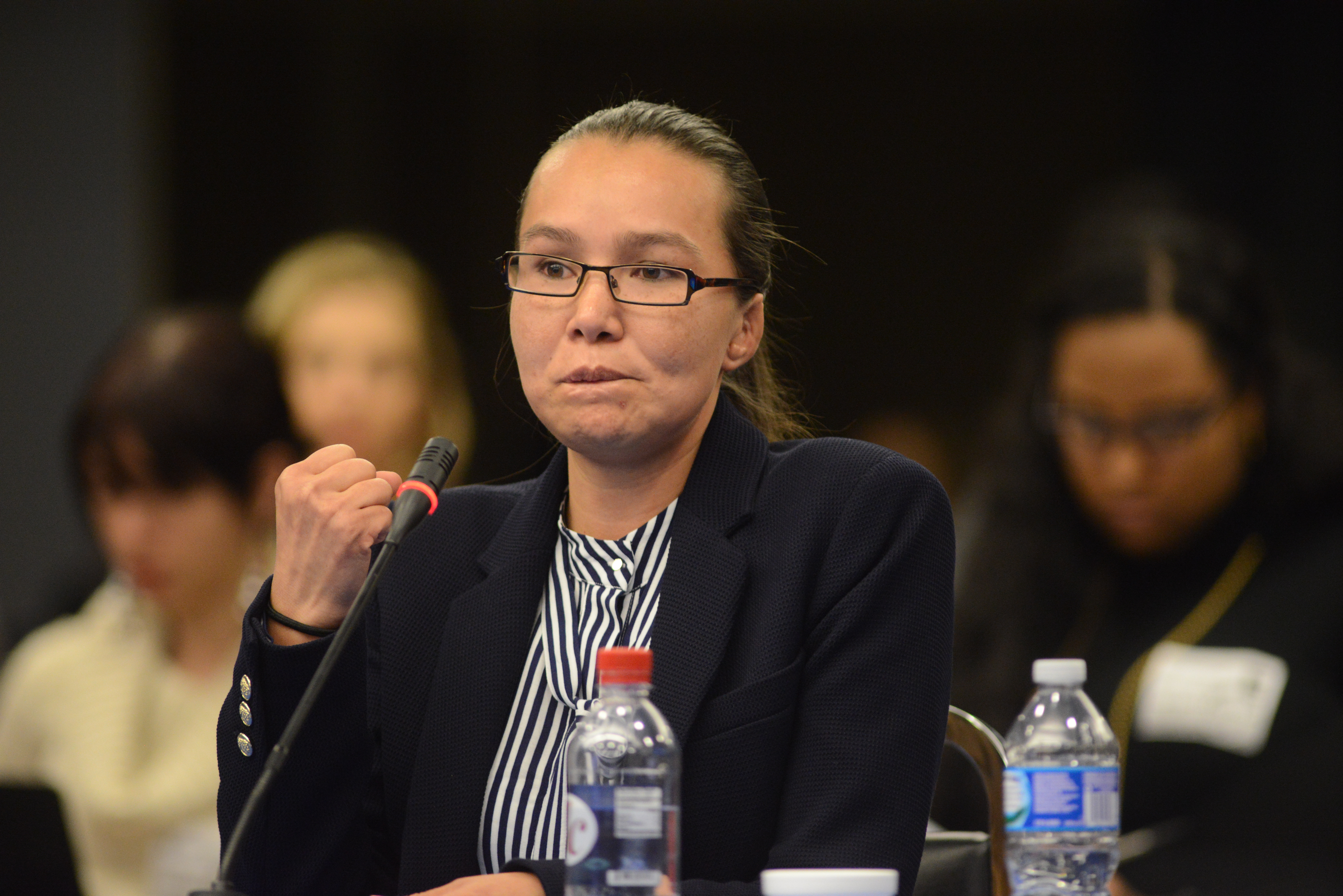 Linda Loaiza presenta su testimonio ante la CIDH